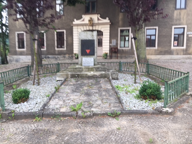 Zur Erinnerung an den Todesmarsch von Buchenwald durch Camburg